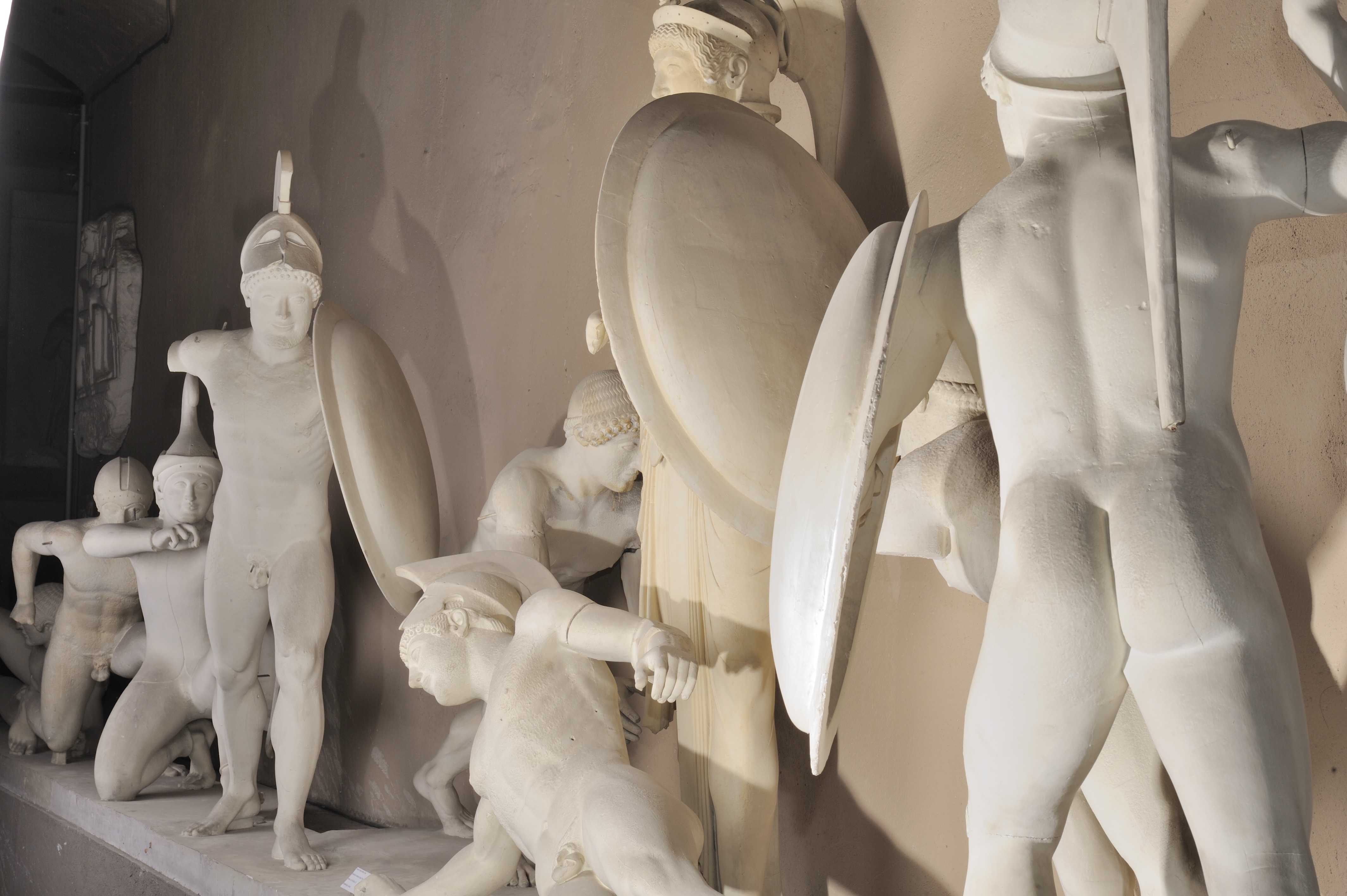 Oeuvre du musée Adolf Michaelis